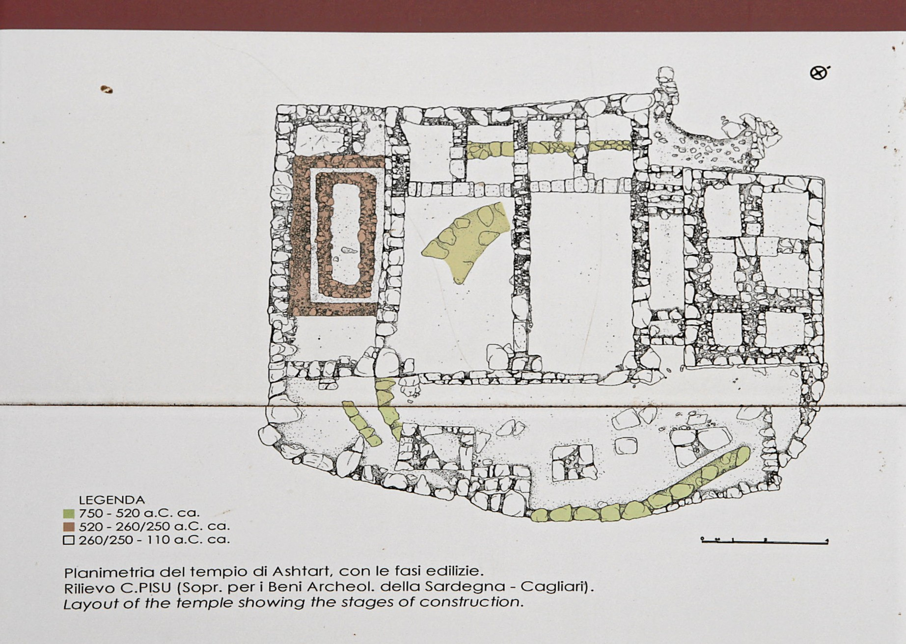 Parco archeologico Monte Sirai, Carbonia: Plan des Astarte - Tempels